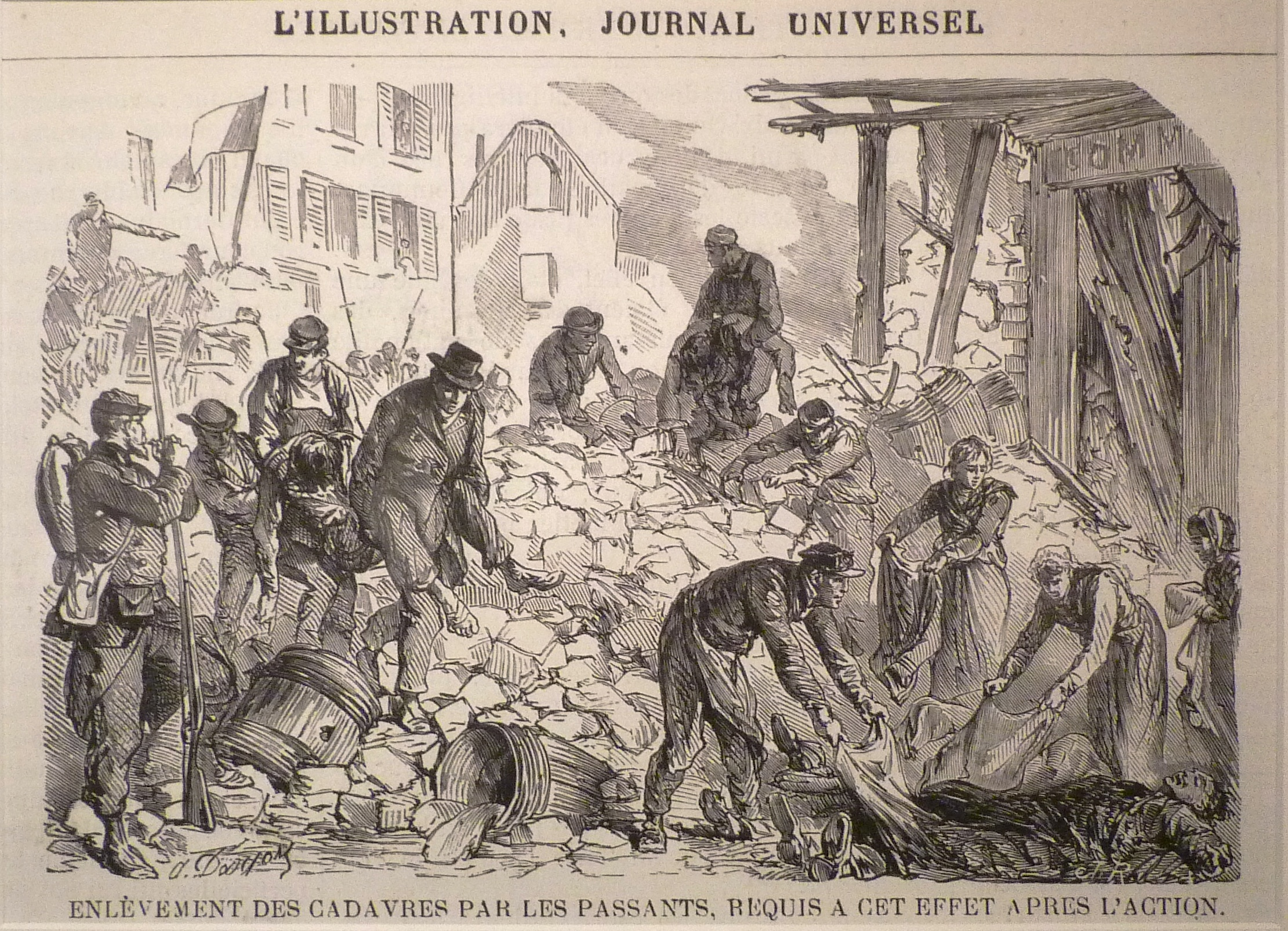 Exposition La Commune de Paris à l'Hôtel de Ville de Paris (18 mars - 28 mai 2011) - Les parisiens sont réquisitionnés pour enlever les cadavres après les combats - Gravure d'Alfred Darjou pour L'Illustration du 10 juin 1871 - Bibliothèque historique de la Ville de Paris.